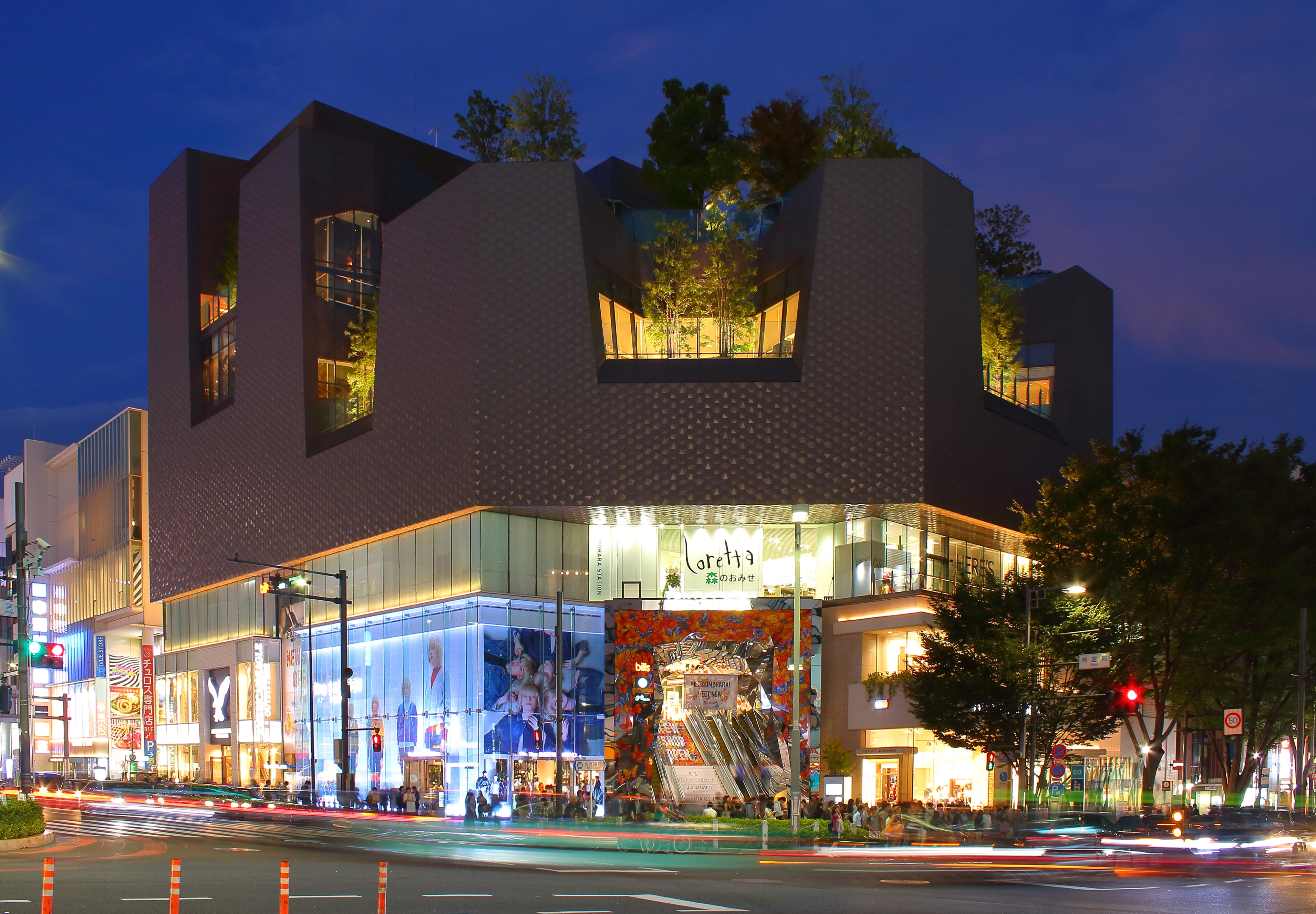 東急プラザ表参道原宿店